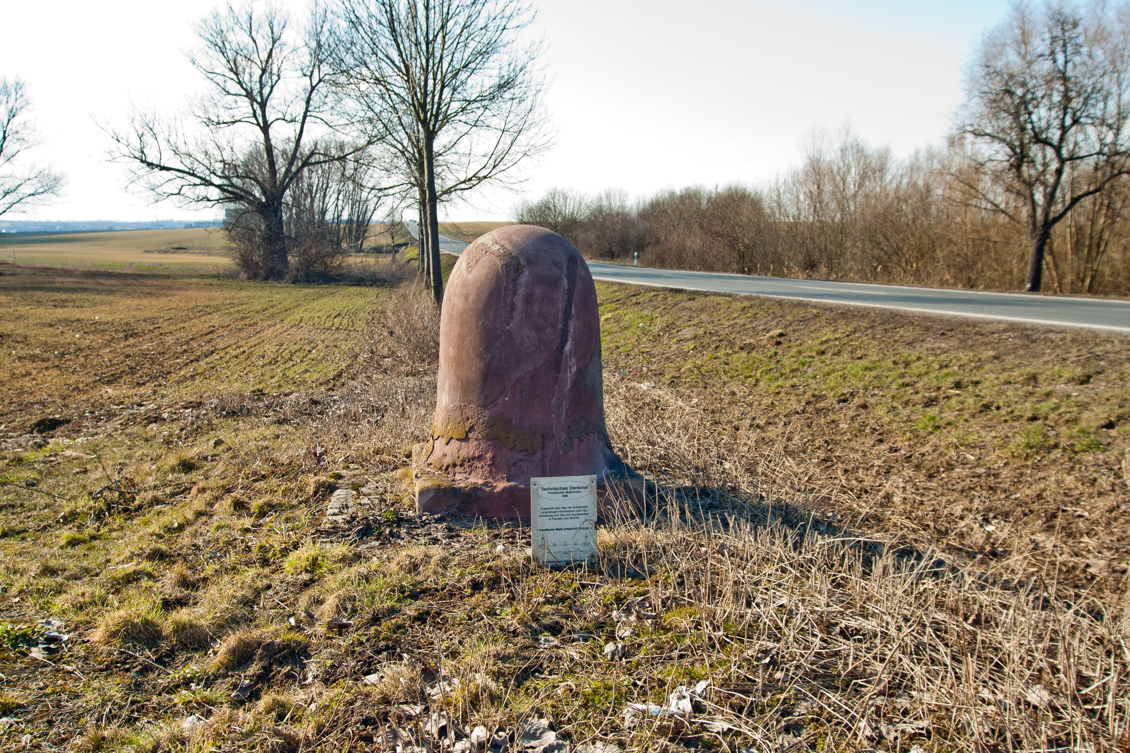 Preußischer Halbmeilenstein an der Bundesstraße 80 bei Lüttchendorf. Früher verlief hier die Kunststraße von Langenbogen über Eisleben und Sangerghausen nach Nordhausen.